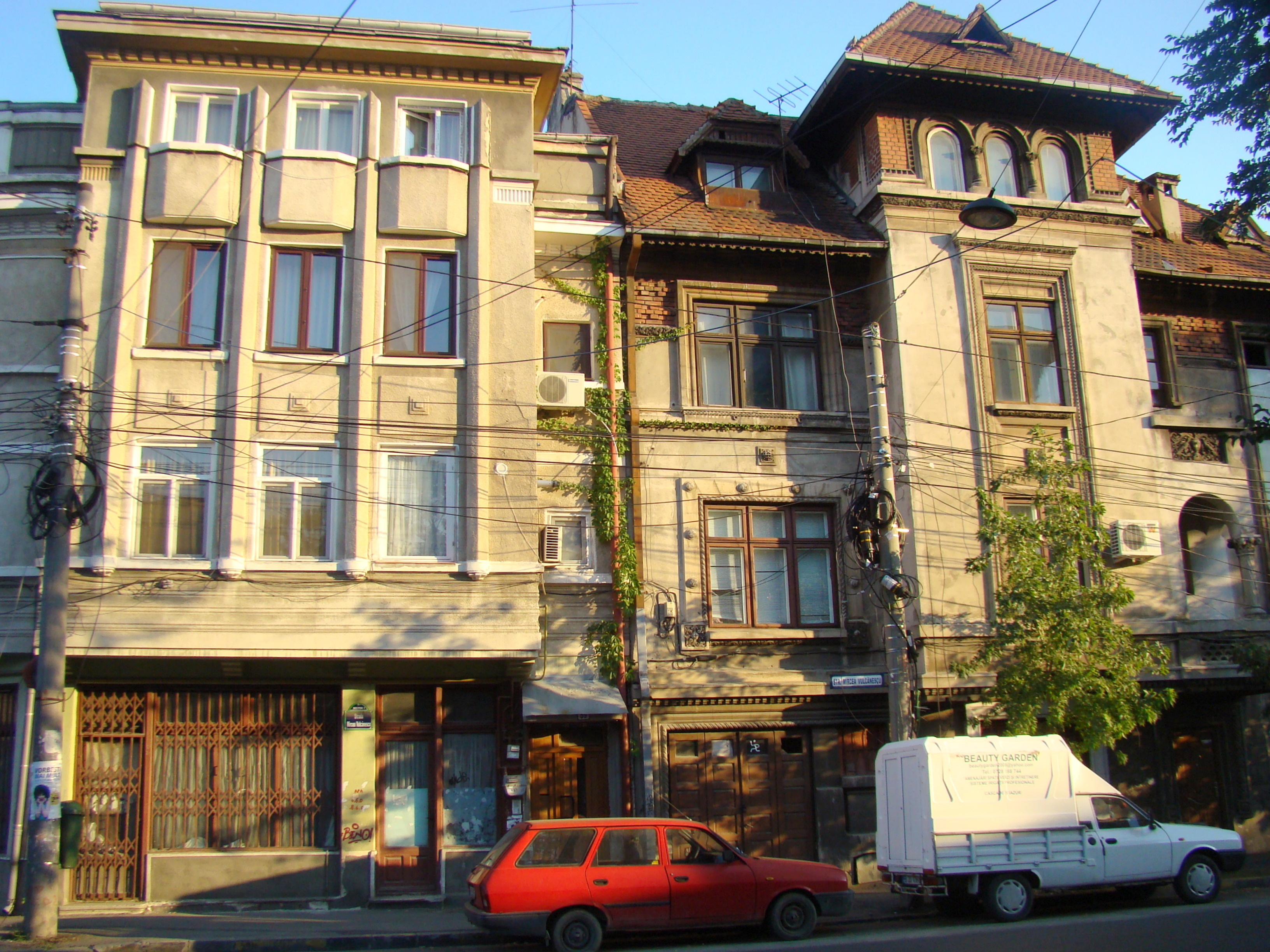 Clădire monument istoric, str. Mircea Vulcănescu, nr.59